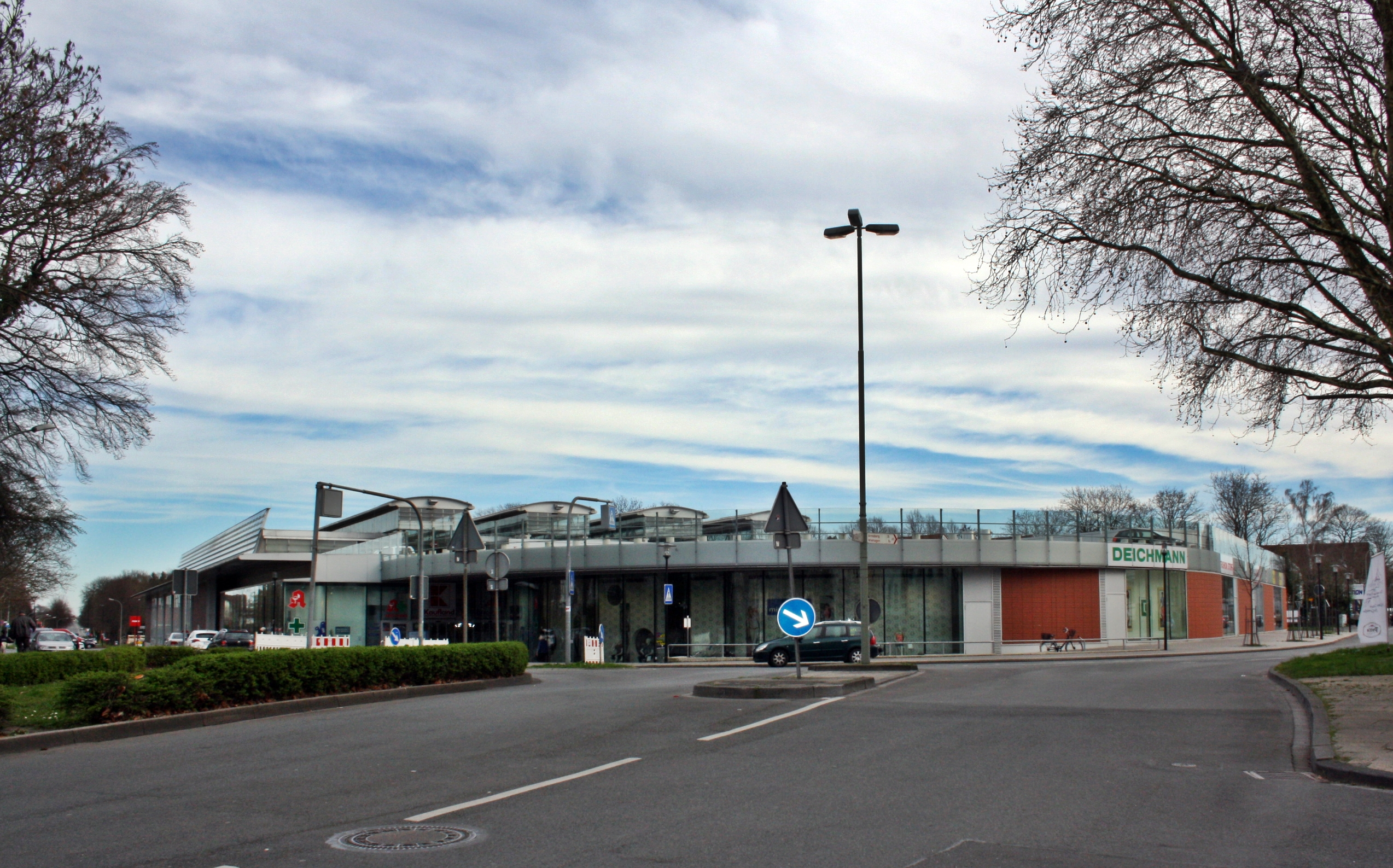 Soester Straße. Blick auf ein Einkaufszentrum